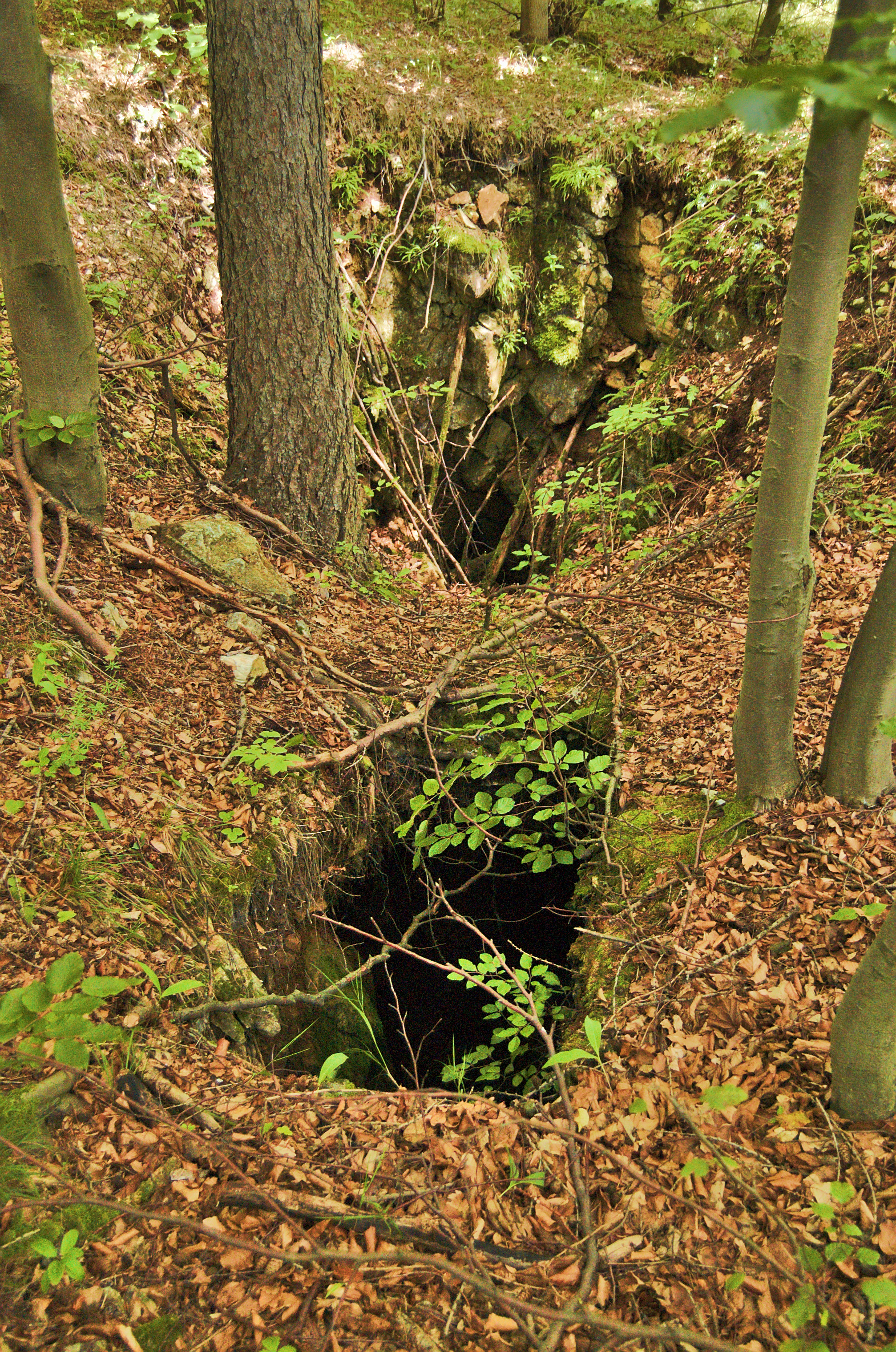 Přírodní rezervace Vratíkov, okres Blansko